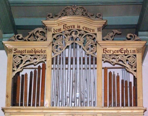 Barocker Orgelprospekt in Arensdorf